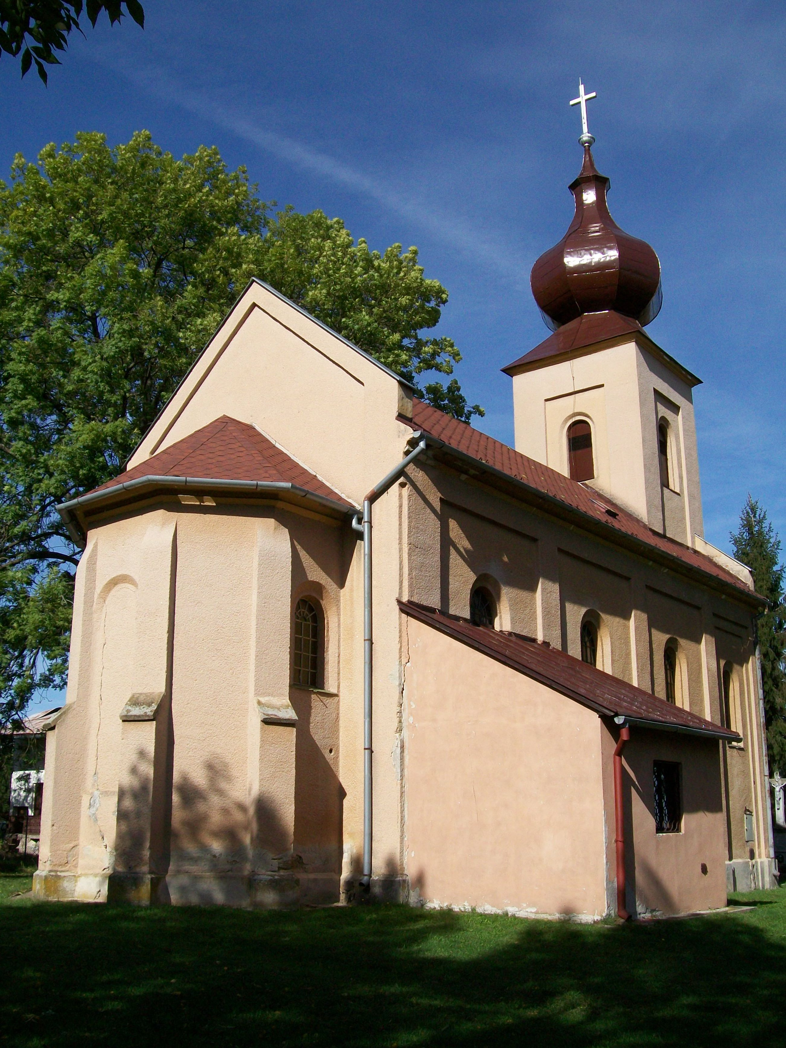 Rímskokatolícky kostol zasvätený Ružencovej Panne Márií, Mikušovce (okr. Lučenec)